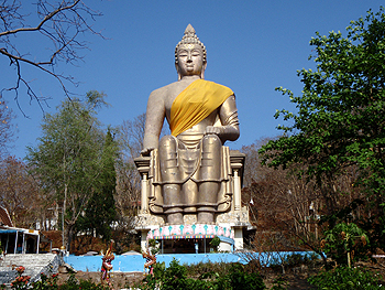 พระพุทธมงคลนิมิตต์